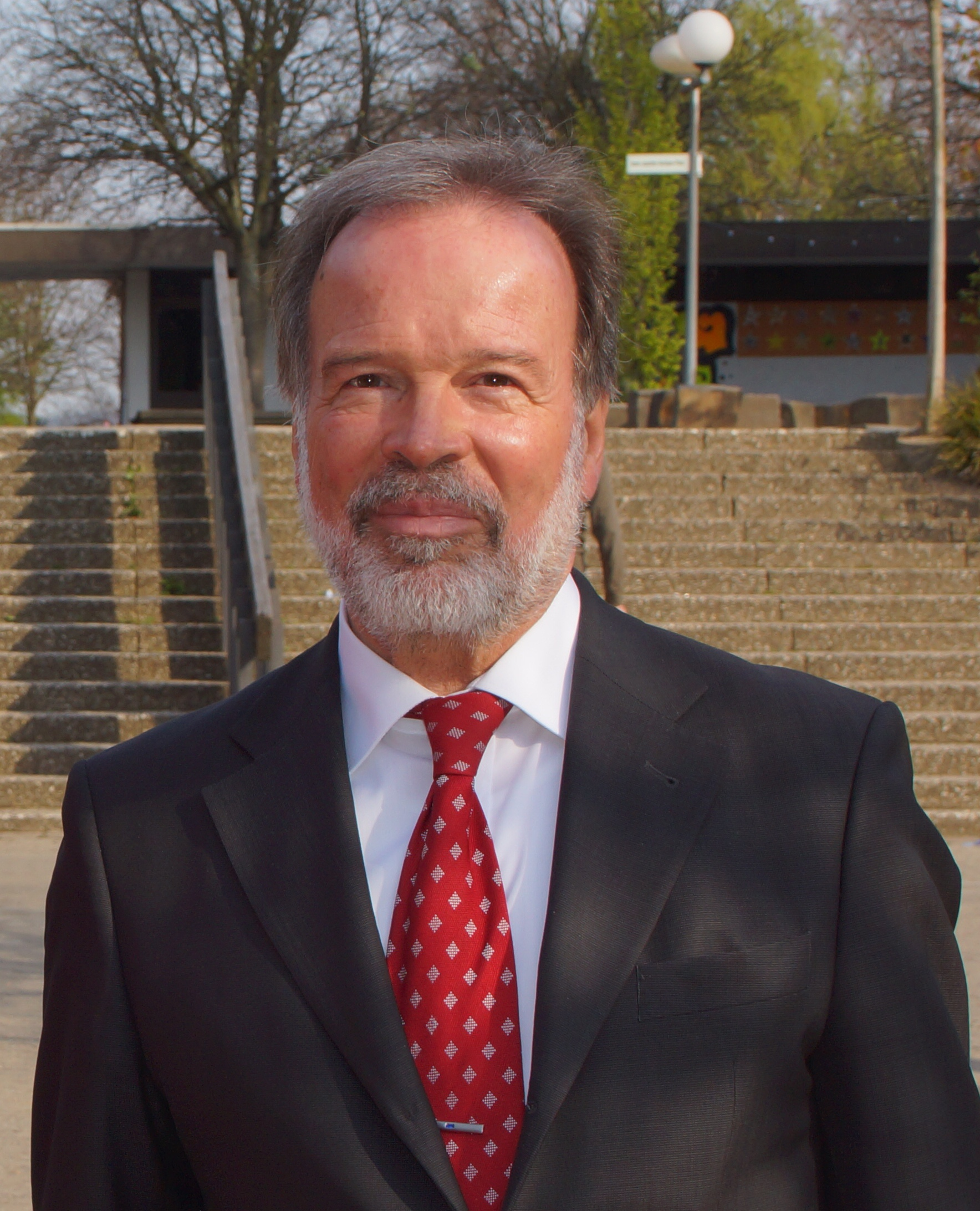 Norbert Walter, visit at the CJD Christophorusschule Königswinter